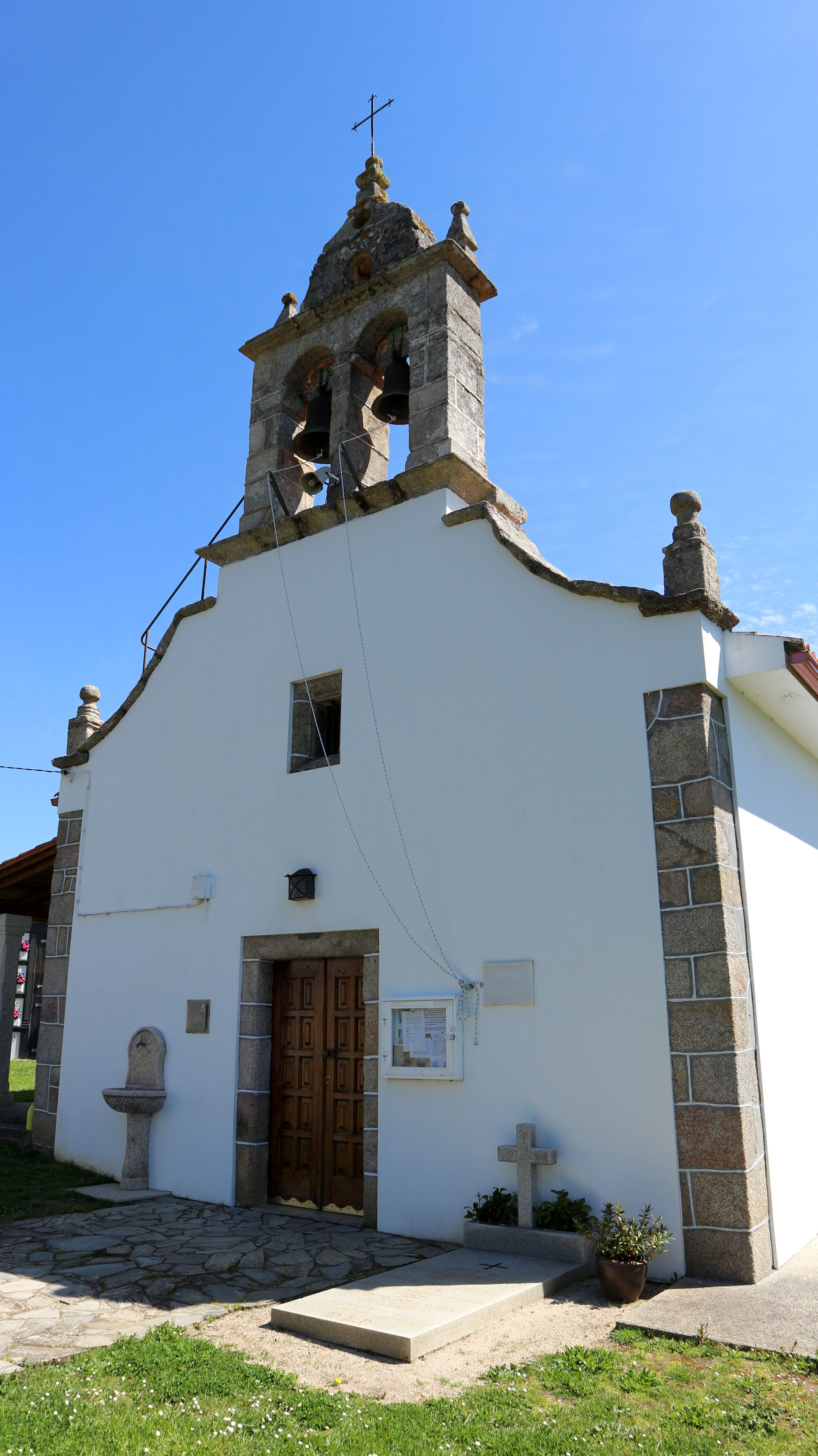 Igrexa de Santa María de Cutián. Cutián, Oza-Cesuras.